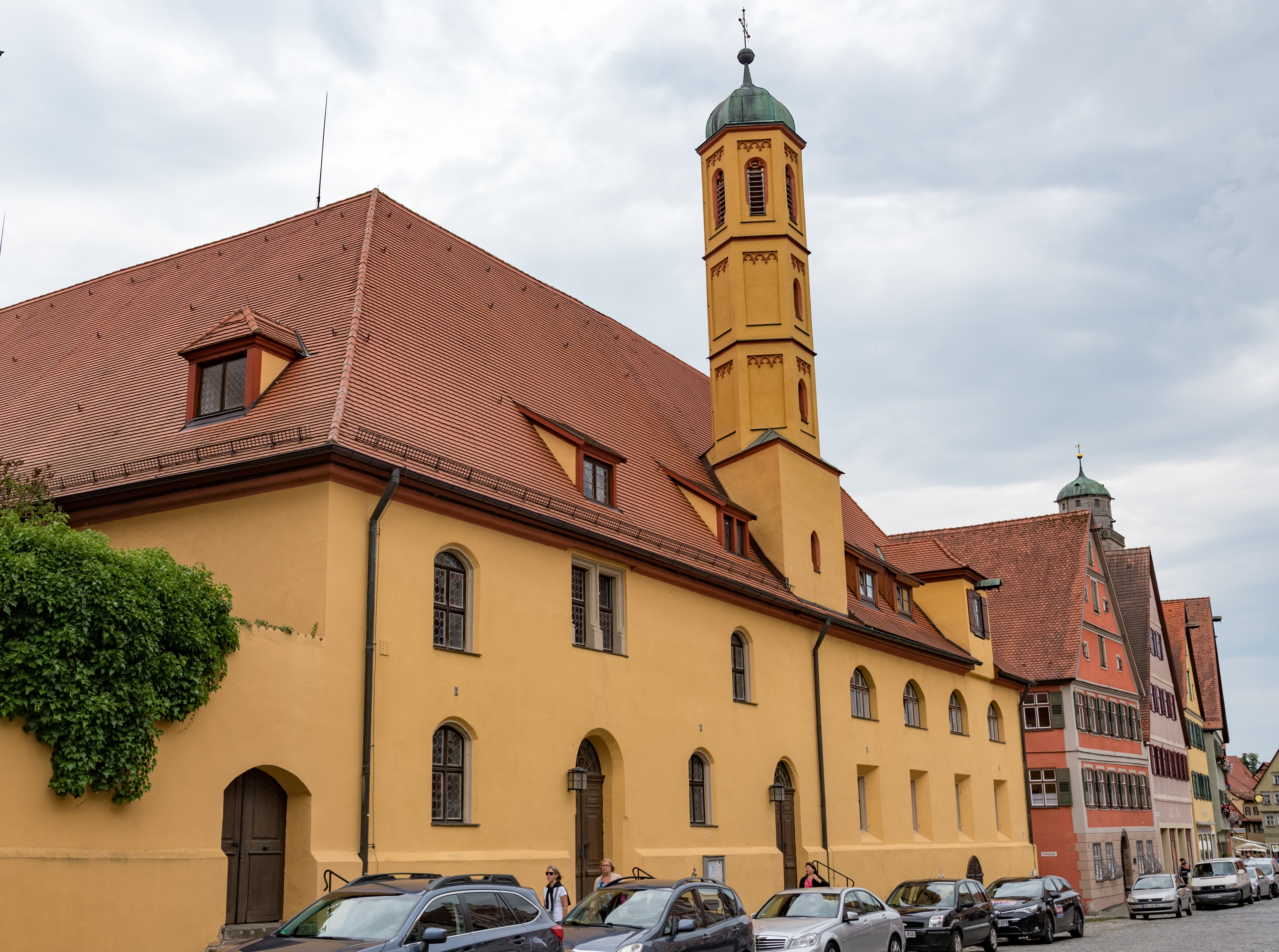 Dinkelsbühl, Dr.-Martin-Luther-Straße 6a